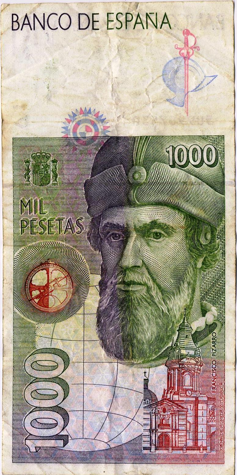 1000 pesetas, 12 de octubre de 1992, Francisco Pizarro